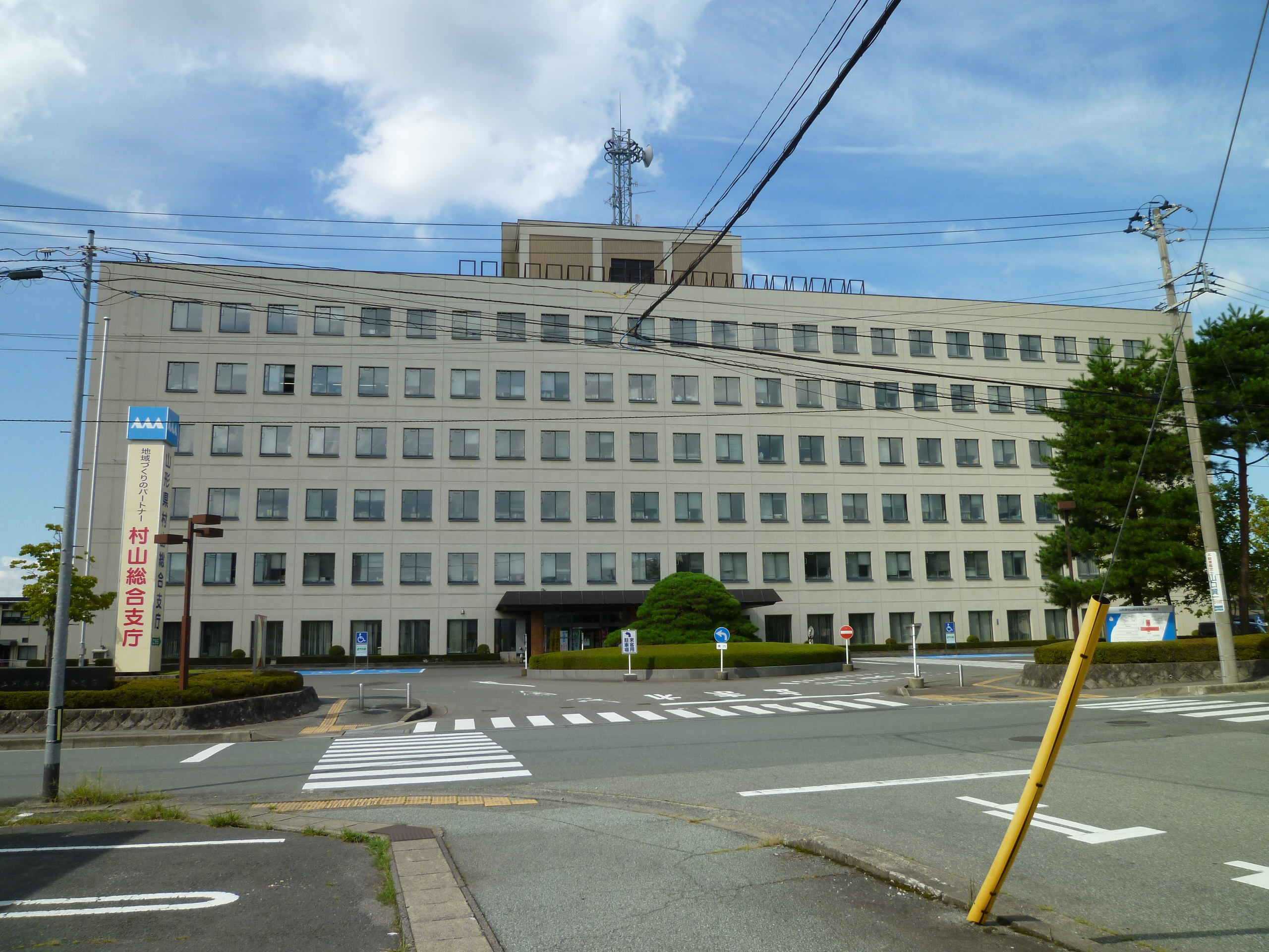 山形県村山総合支庁